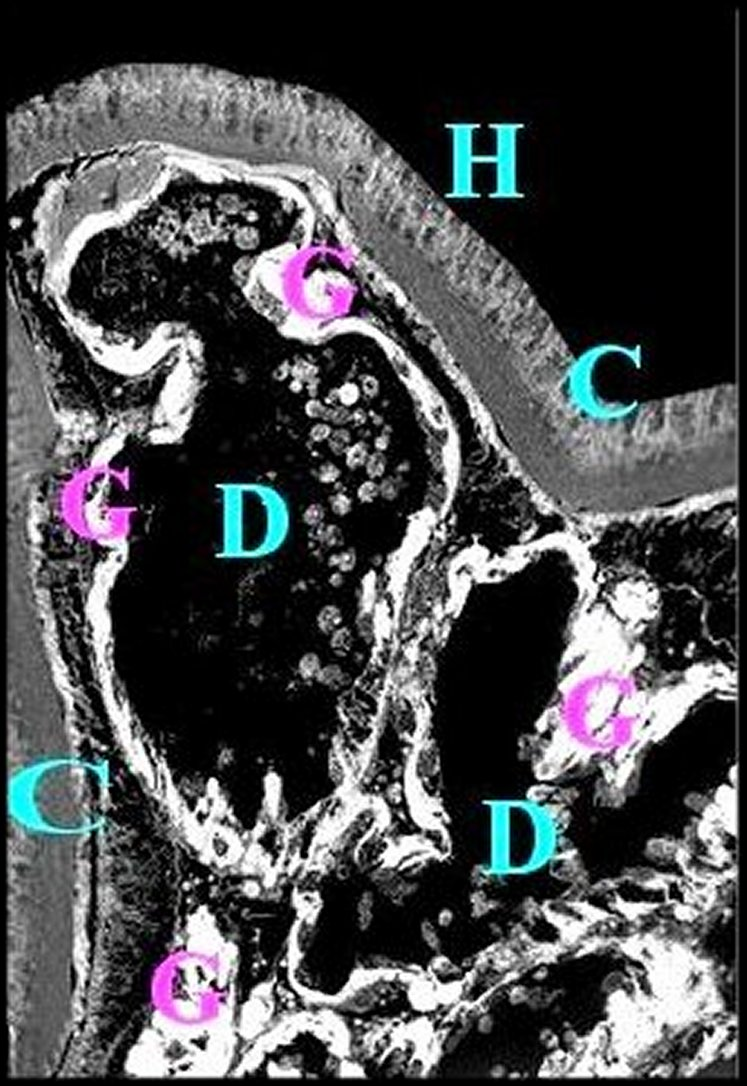 Mastophora cornigera, femelle adulte : même coupe histologique transversale du prosoma montrant les détails de la corne en lumière polarisée "illuminant" les cellules à guanine..